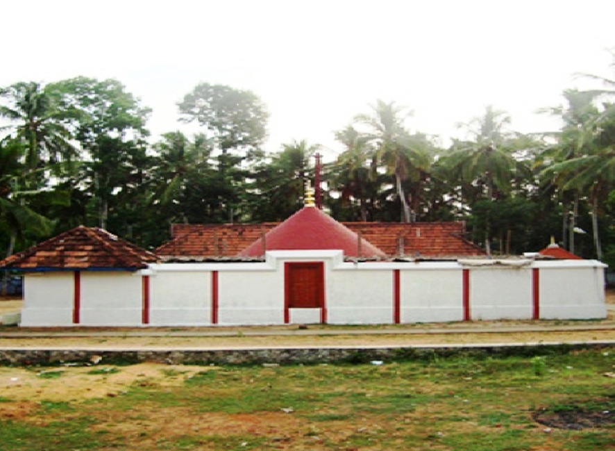 കുടപ്പനക്കുന്ന് മഹാദേവക്ഷേത്രം, തിരുവനന്തപുരം